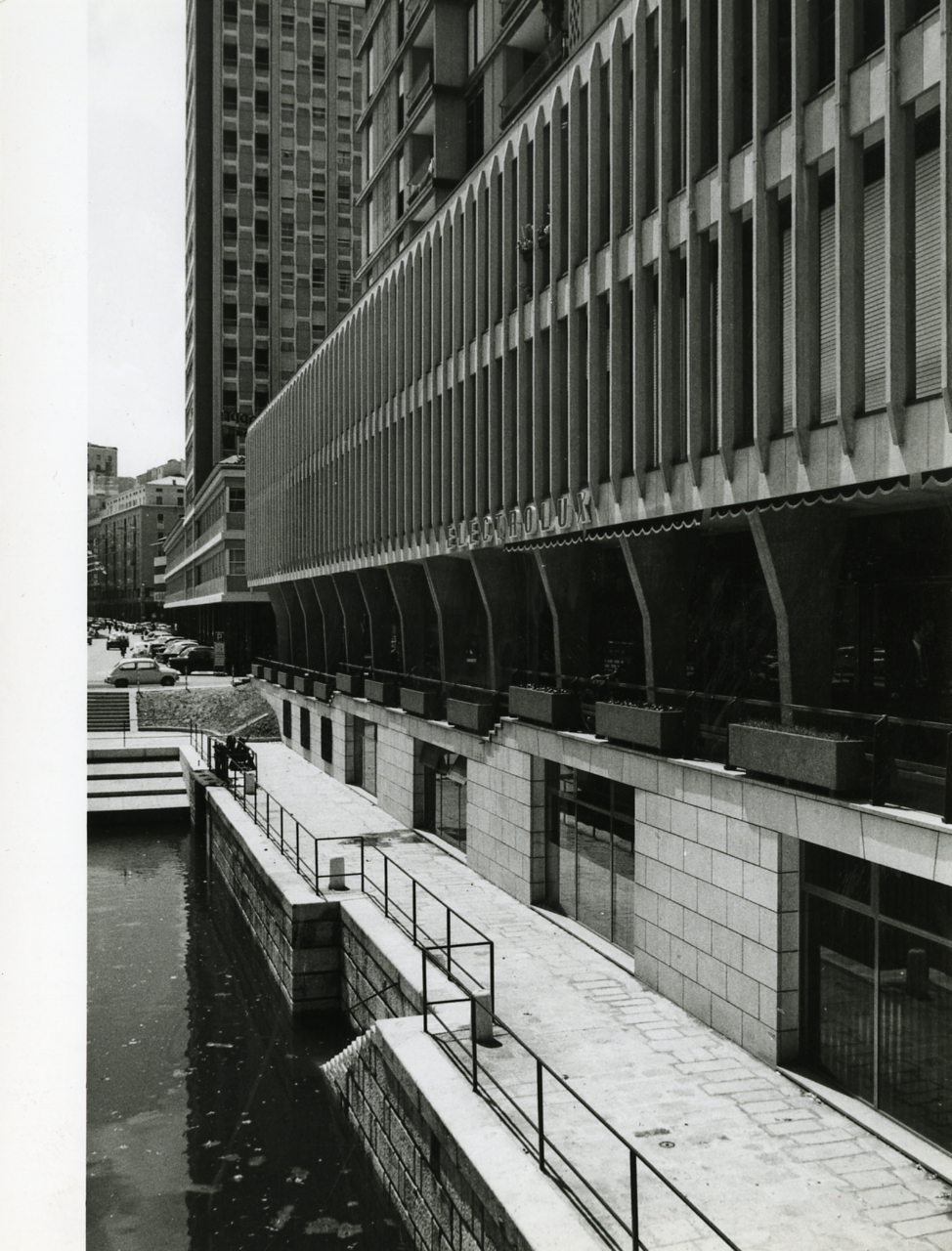 Servizio fotografico : Padova, 1967 / Paolo Monti. - Stampe: 6 : Positivo b/n, gelatina bromuro d'argento/ carta, 18x24. - ((Al verso delle stampe manoscritti i numeri dei negativi corrispondenti (formato 35 mm): 367, 370, 371, 375, 394, 396; iscrizioni didascaliche manoscritte a matita: "Via Altinate con un/ cinema poco '[illeggibile]' ", "Nuove costruzioni vicino/ alla Casa Broccadello (in fondo)/ (Via Vitt. Emanuele 2°)", "Nuova edilizia/ Via S. Francesco/ angolo via Cesarotti", "Nuova edilizia/ Via S. Sofia?/ [...]", "Largo Europa (via Giotto)/ Nuove costruzioni dove/ erano le porte Contarine"; timbro a inchiostro con copyright: "© - Credit to:/ Paolo Monti/ Via T. Tasso [...]/ Milano [...]". - Sul coperchio della scatola iscrizione didascalica manoscritta a pennarello nero: "Emilia - Bologna". - Occasione: Documentazione per la pubblicazione: Diego Valeri (a cura di), "Padova: i secoli, le ore", Bologna, Edizioni Alfa, 1967. - Fonte: Monografia di Valeri Diego (a cura di): Padova: i secoli, le ore, Bologna, Edizioni Alfa (1967). - Fonte: Agenda di Paolo Monti: Monti/ 3 aprile 1966 - 9 marzo 1971/ 12421-16823 (1966-1971), presso Archivio Paolo Monti